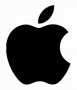 Logo de Apple.inc